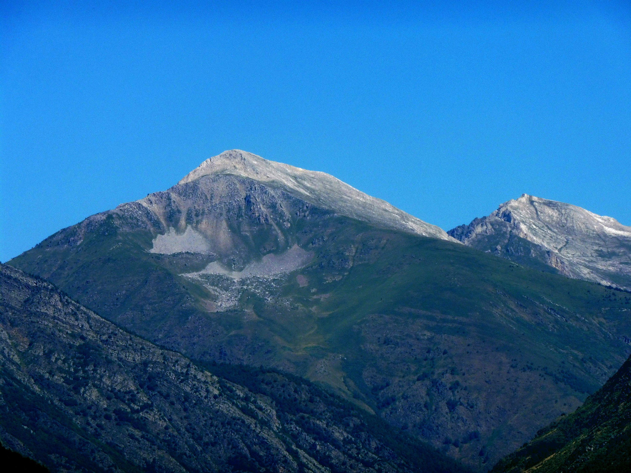 Els Pics de Qüenca i de Moredo des d'Esterri d'Àneu (Alt Àneu) This is a a photo of a natural area in Catalonia, Spain, with id: ES510084